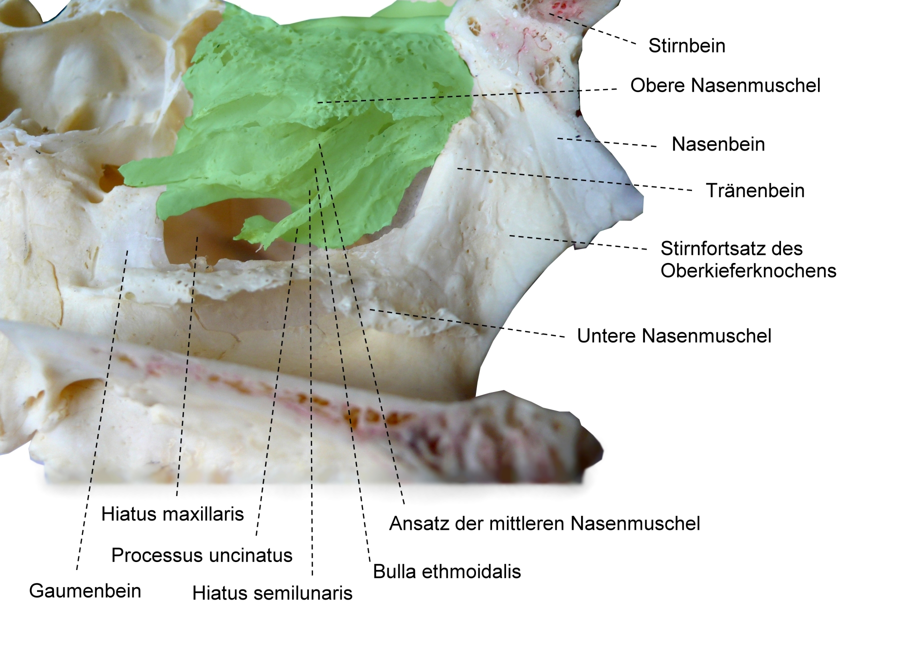 Siebbein (grün). Laterale Nasenwand.